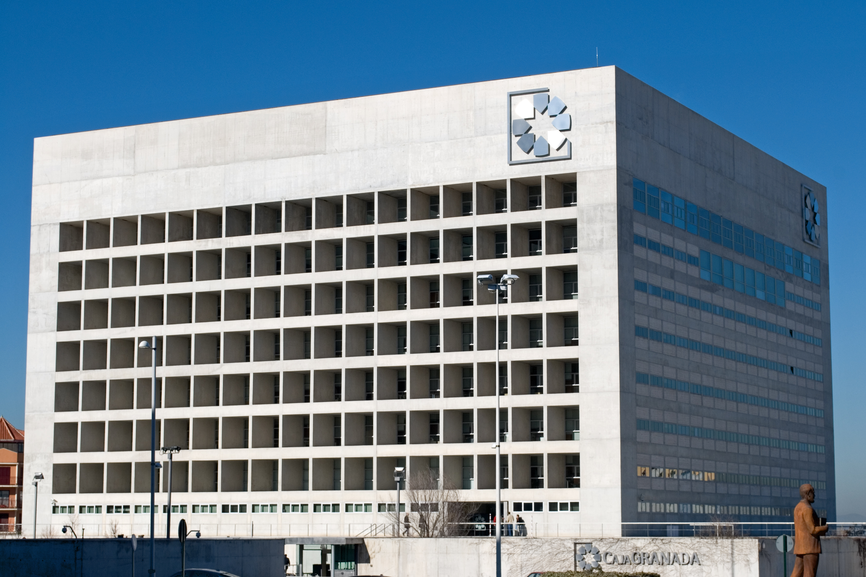 Edificio Caja Granada, Arquitecto Alberto Campo Baeza